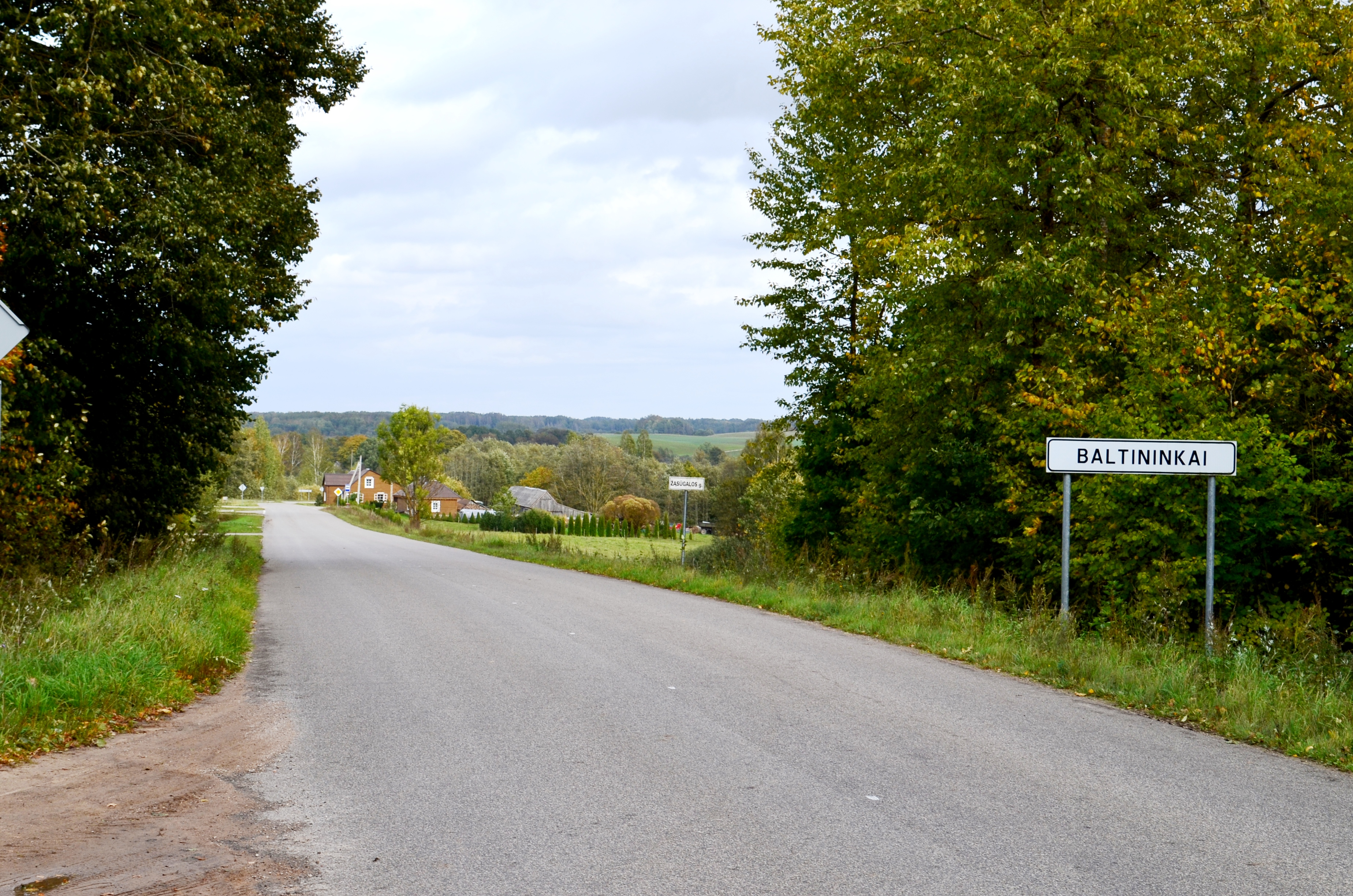 Baltininkai, Telšių raj.